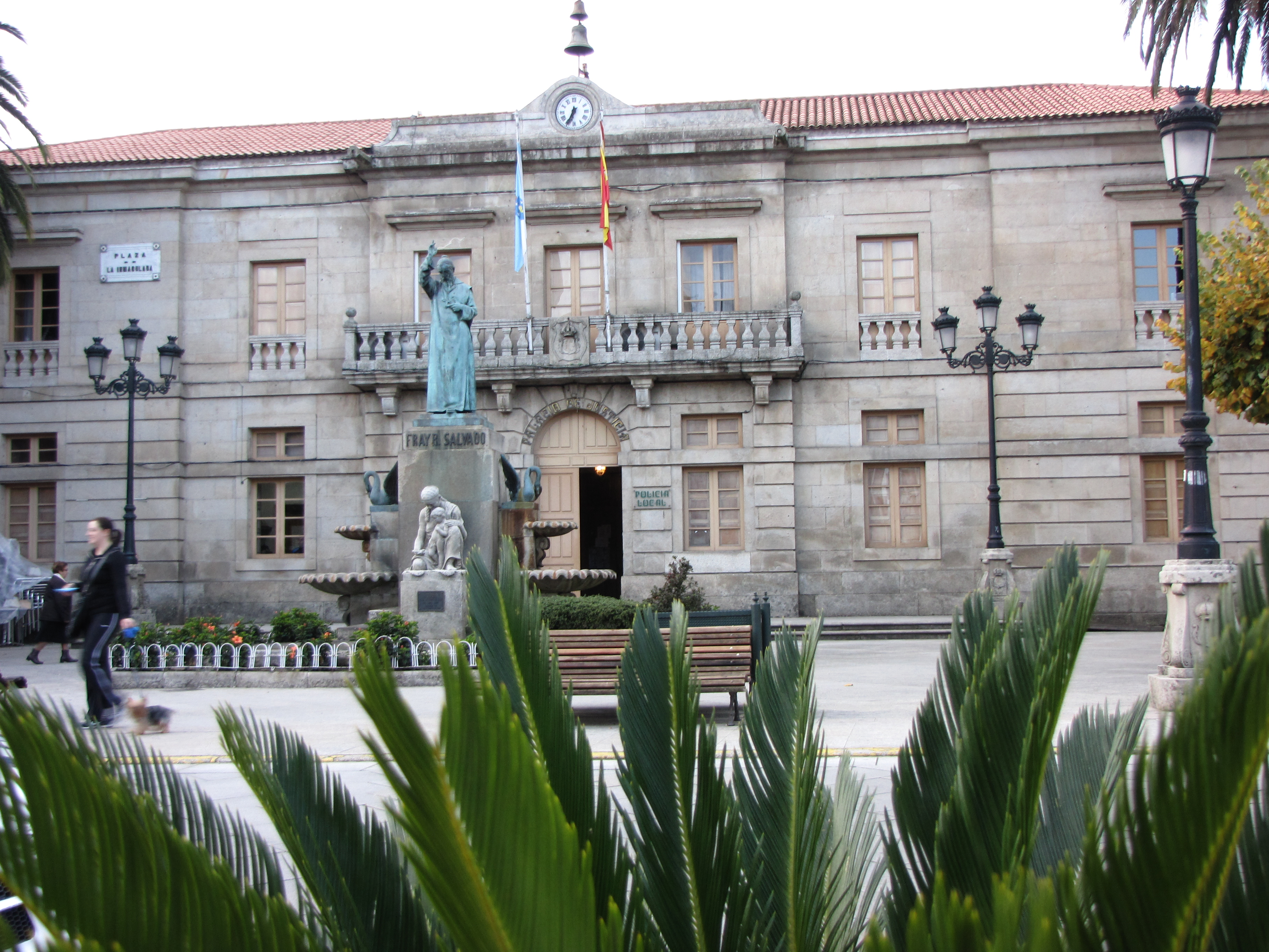 Plaza de la inmaculada